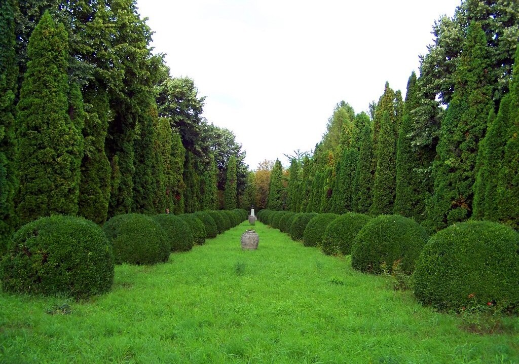 Iaşi Botanical Garden